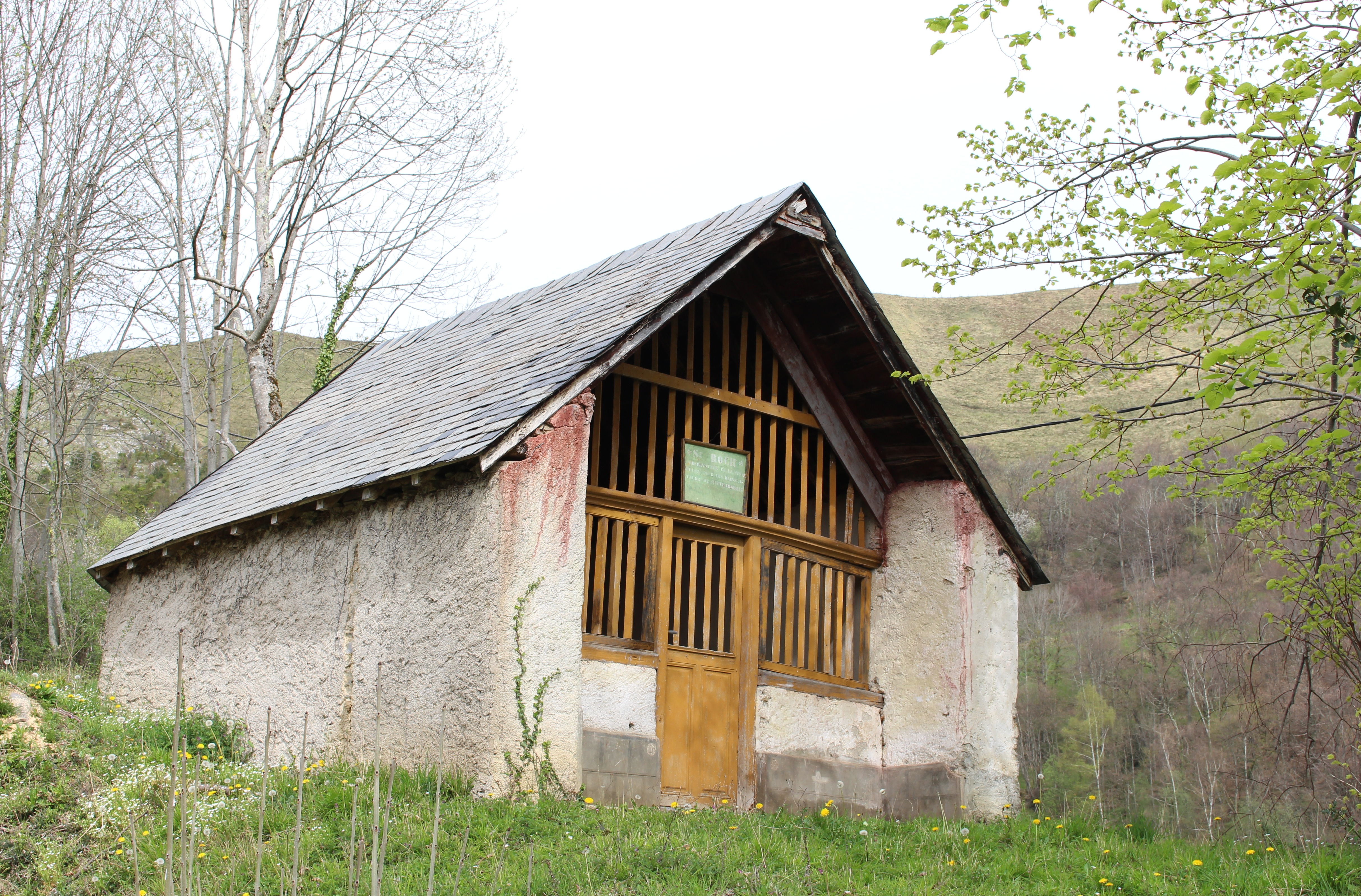 Chapelle Saint-Roch de Bulan (Hautes-Pyrénées)